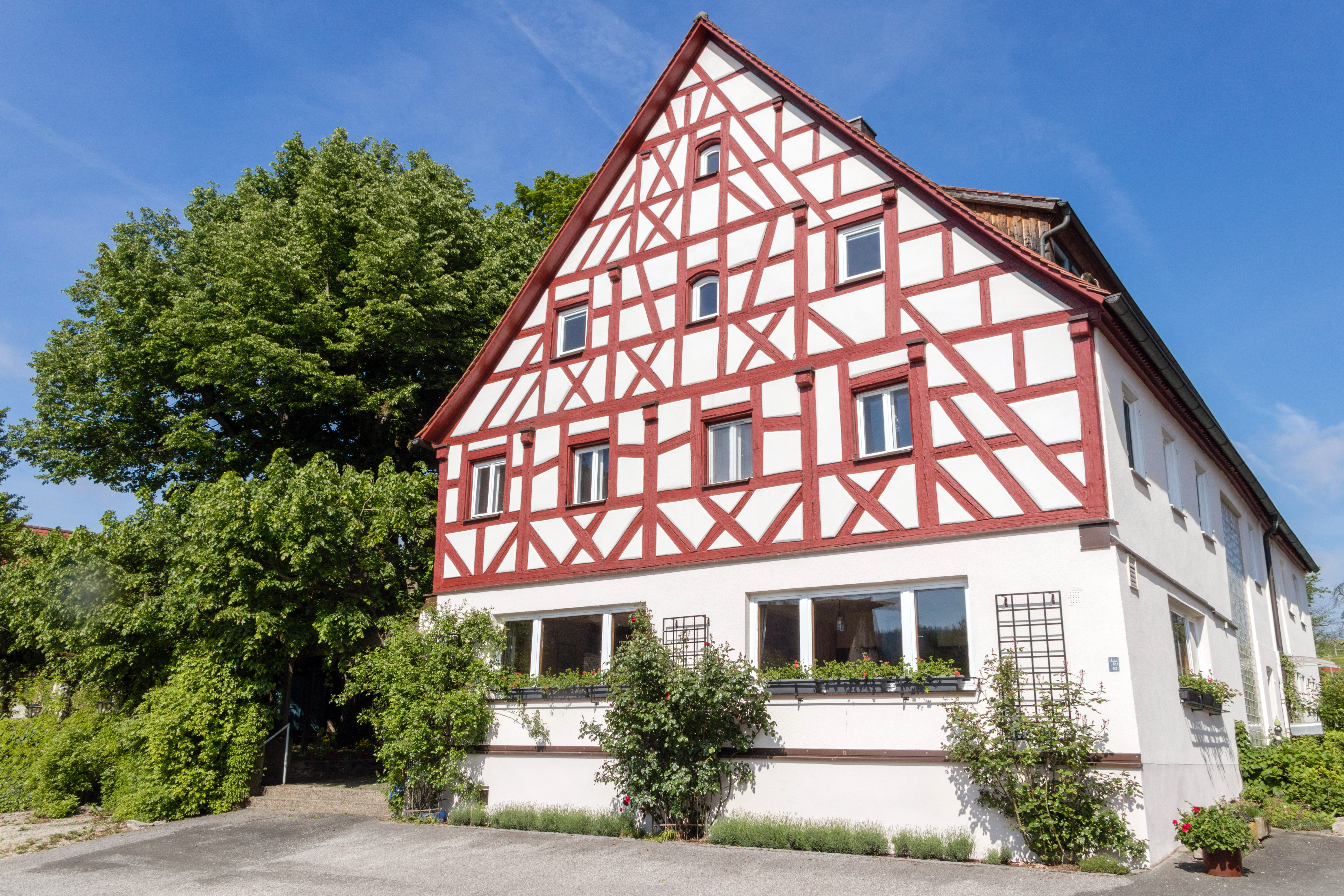 Schirmlinde, Kersbach, Naturdenkmal